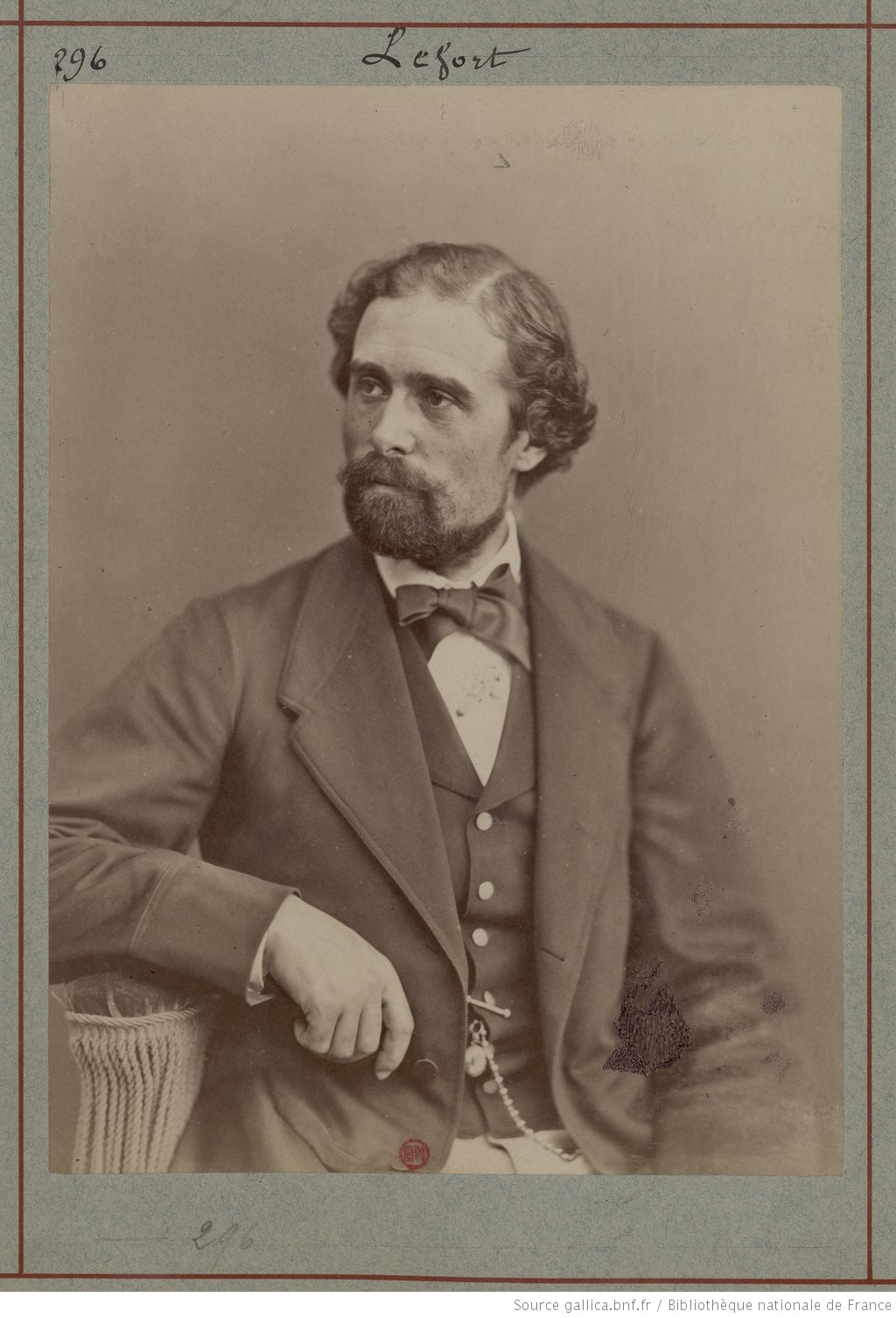 Jules Lefort en 1900.